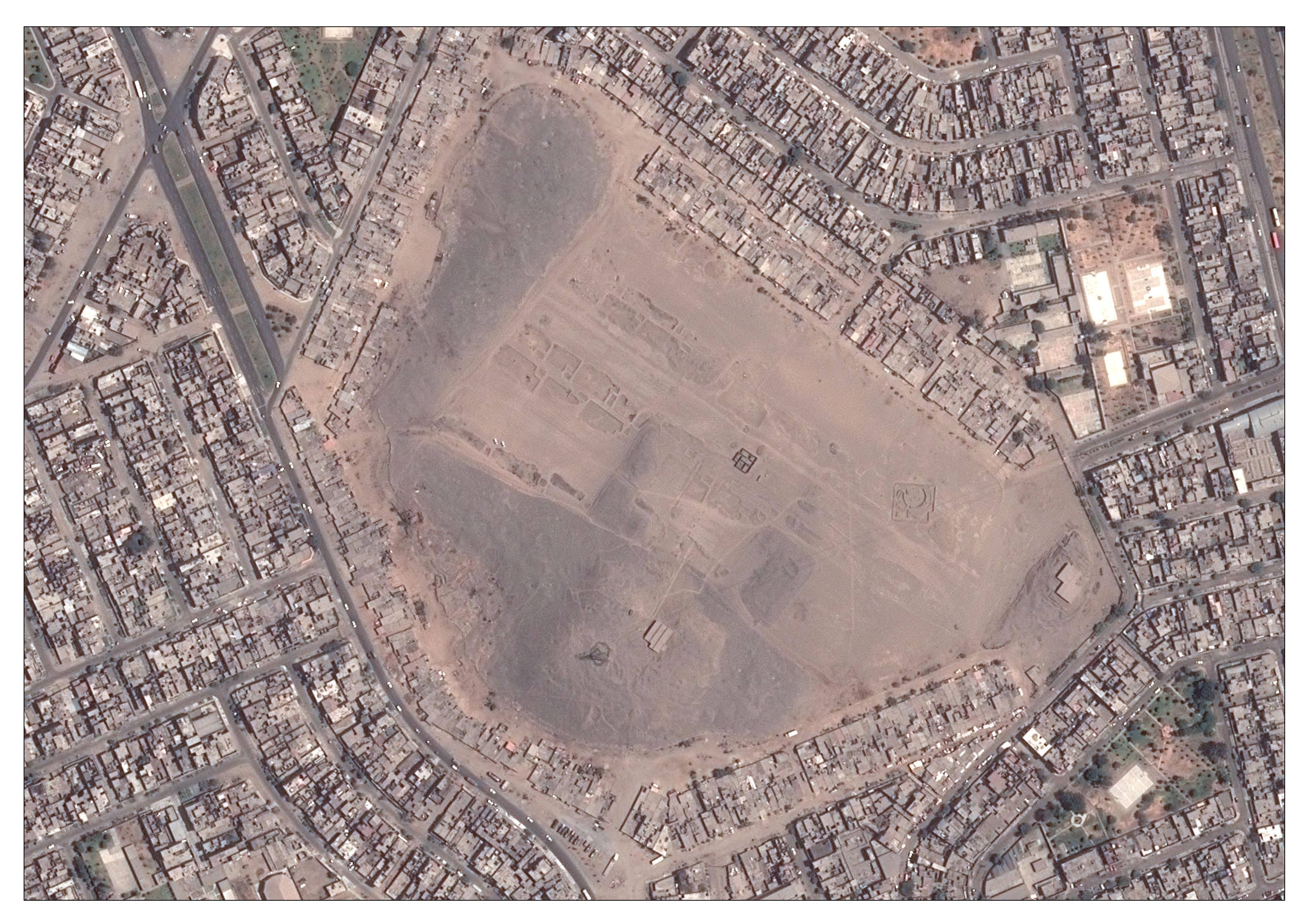 Huaca Garagay. Imagen del PerúSAT-1.